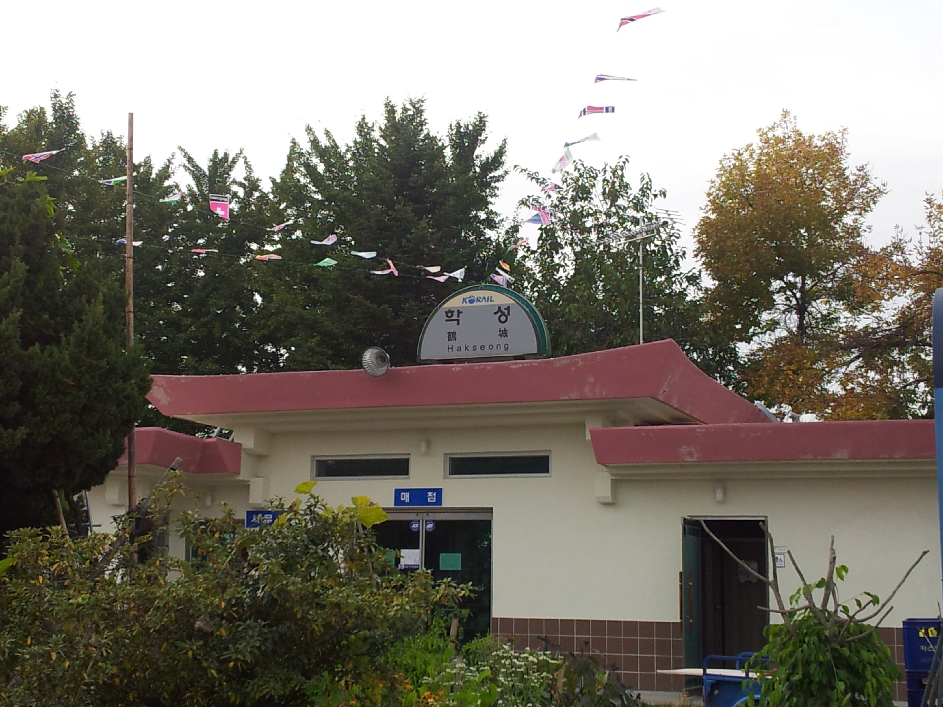 학성역 건물